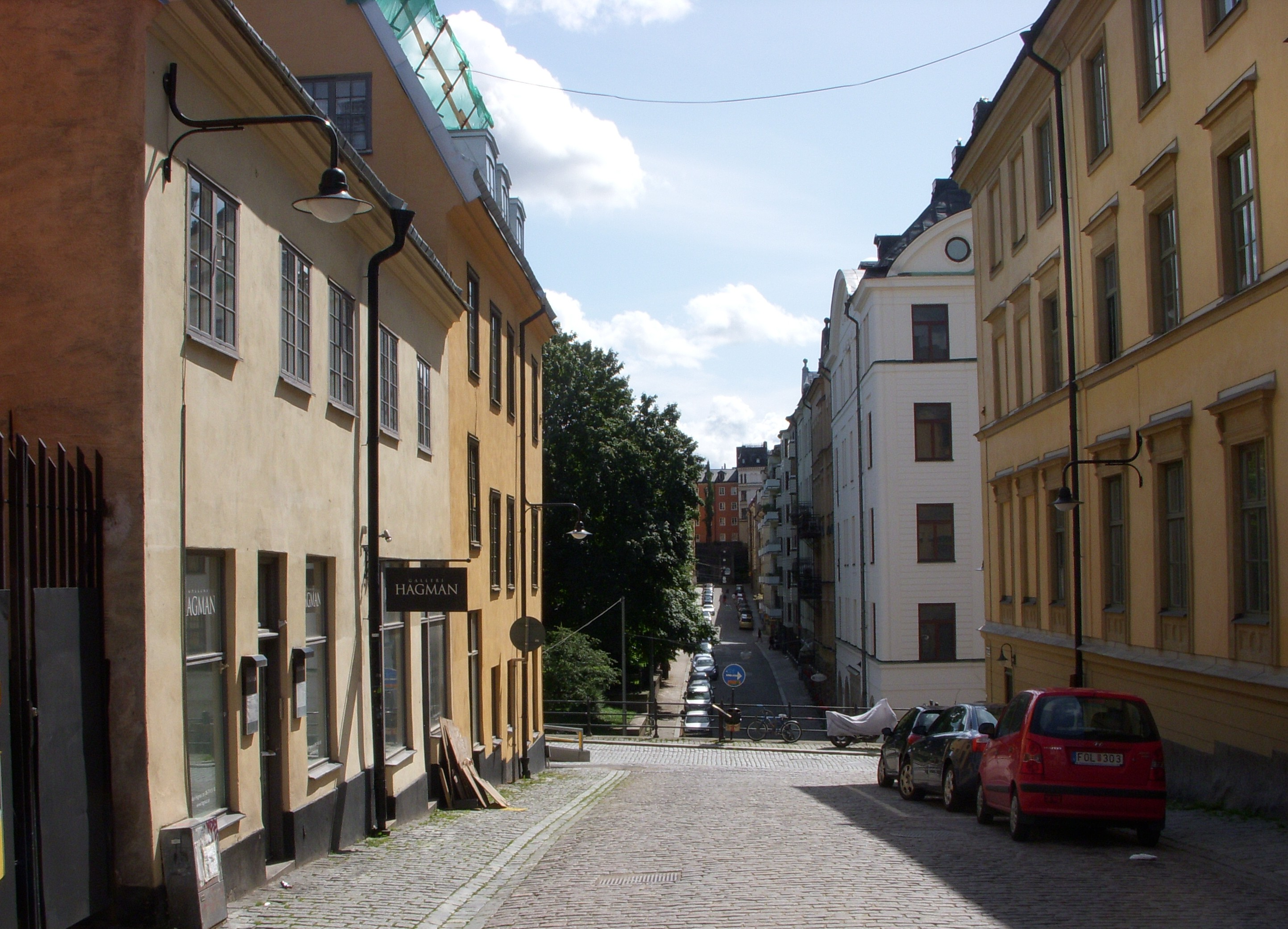 Bellmansgatan på Södermalm, Stockholm